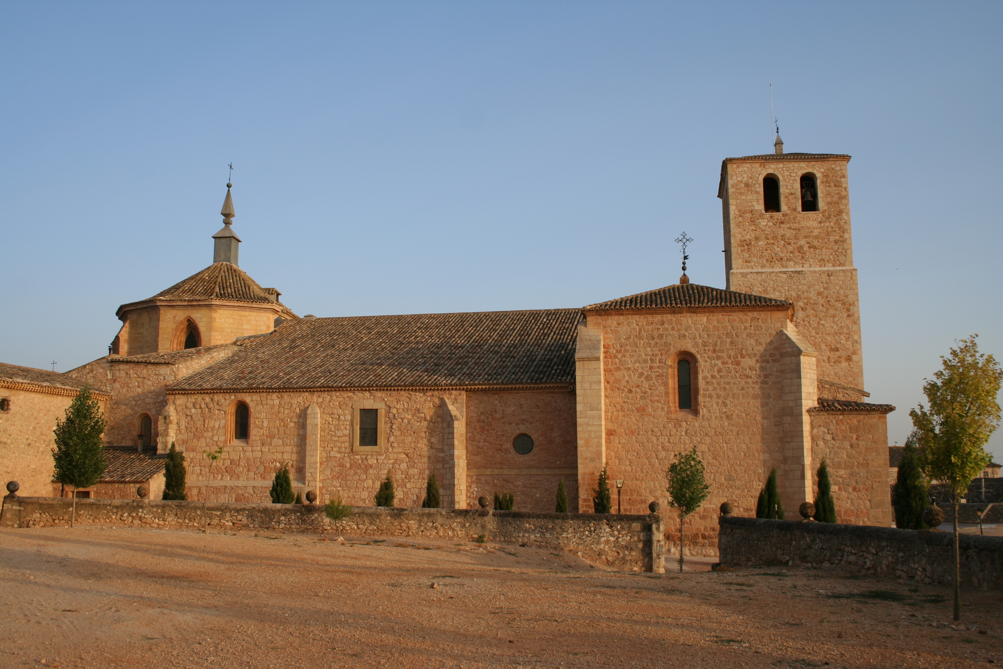 La Colegiata de Belmonte, Cuenca (España).